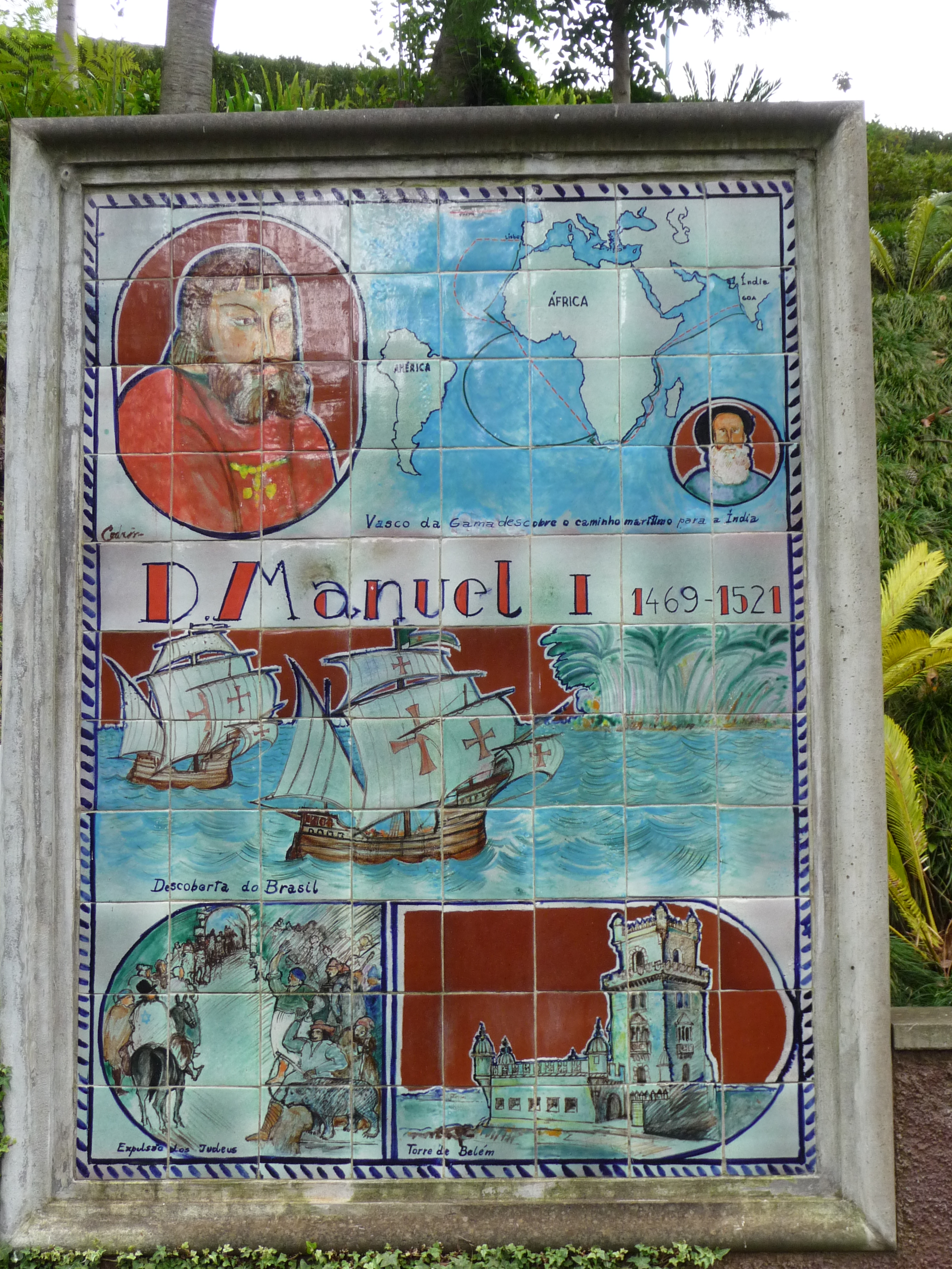 I. Mánuel portugál király uralkodásának fontosabb eseményei (Madeira, Monte, Trópusi kert) — azulejo 1. Vasco da Gama eléri Indiát a tengerről, 2. Brazília felfedezése, 3. A zsidók kiűzése, 4. a Belém-torony felépítése